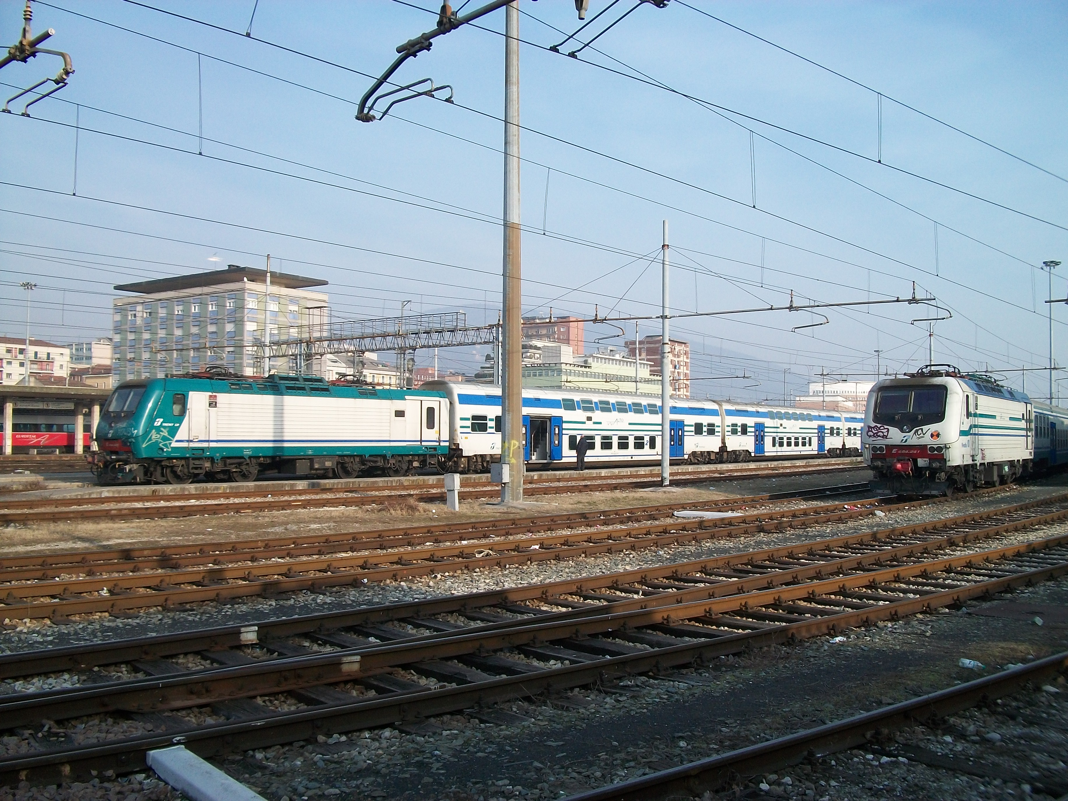 Vista sulla stazione